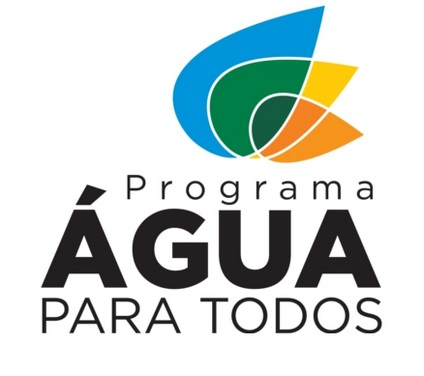 Logotipo do Programa Água para Todos.